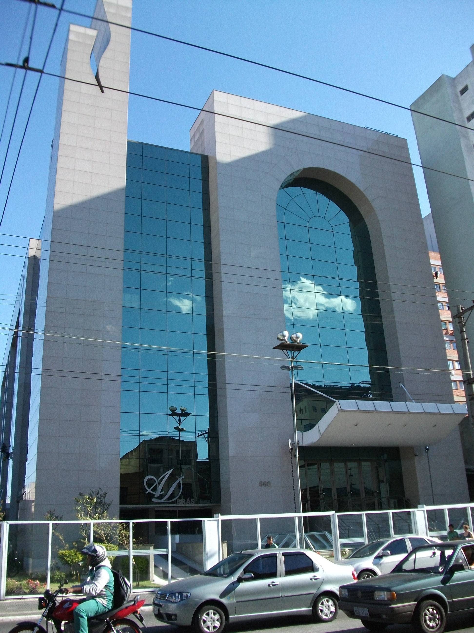 Prédio da Igreja protestante Assembléia de Deus da Avenida Celso Garcia no bairro do Brás na cidade de São Paulo.